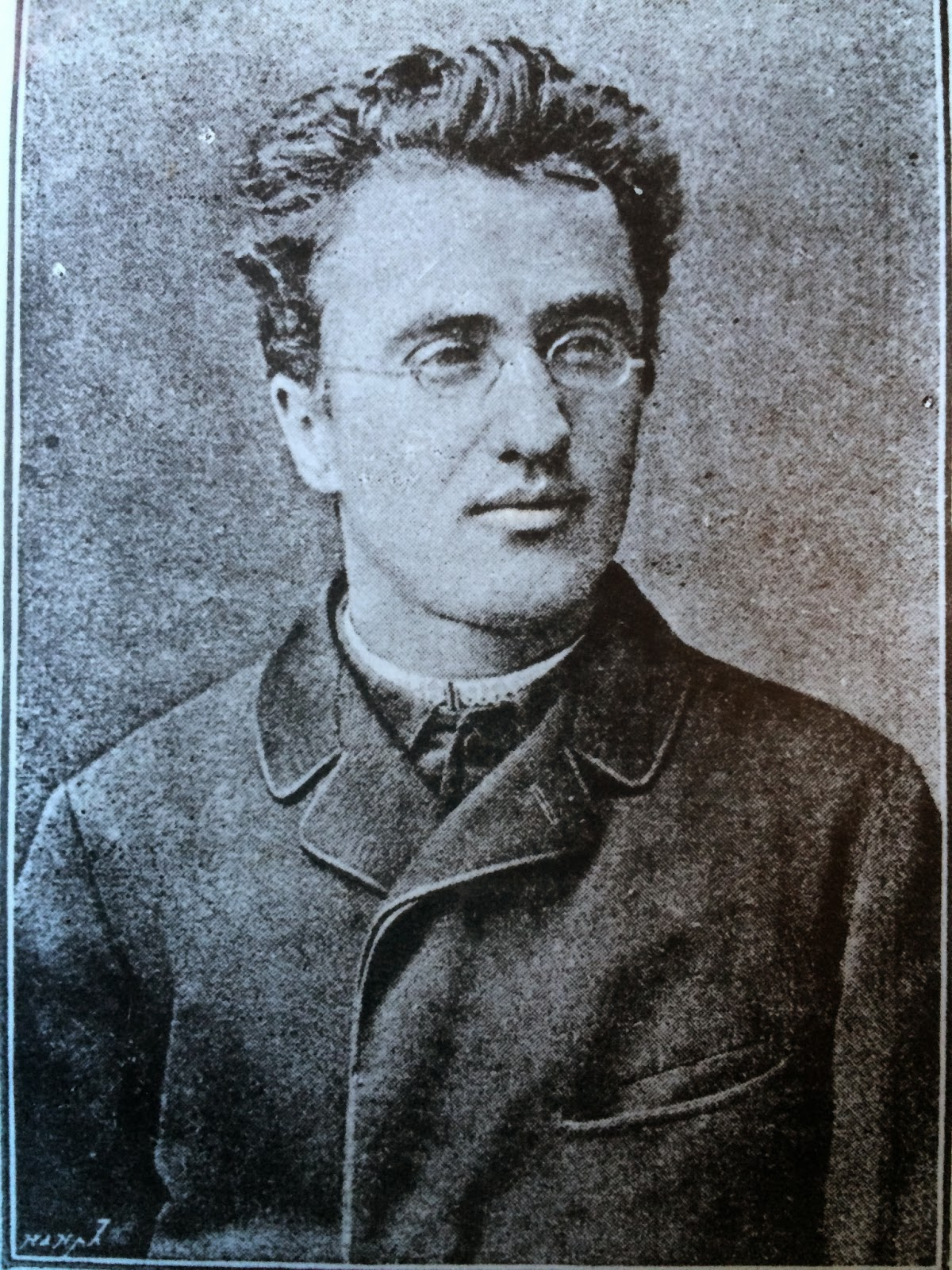 Alois Dostál